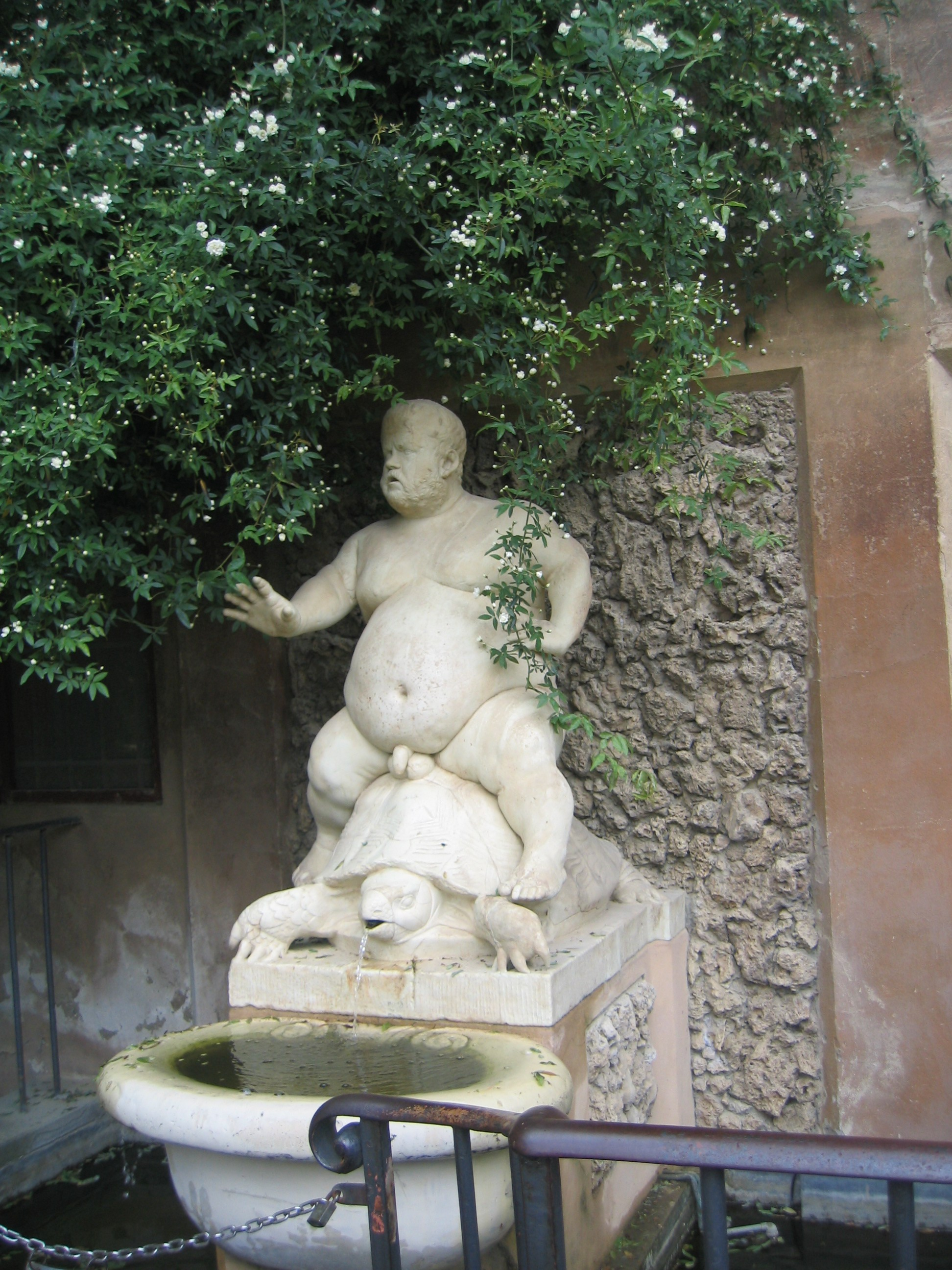 "Statua del Bacchino" nel Giardino di Boboli (Fi), Valerio Cioli